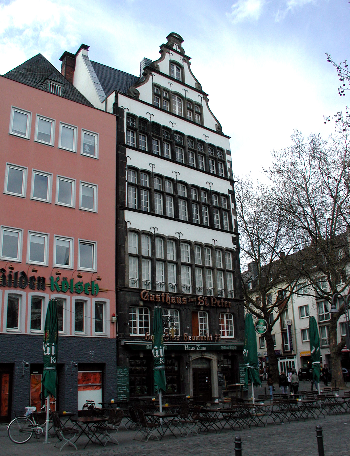 Köln, Haus zum St. Peter am Heumarkt (Zims)